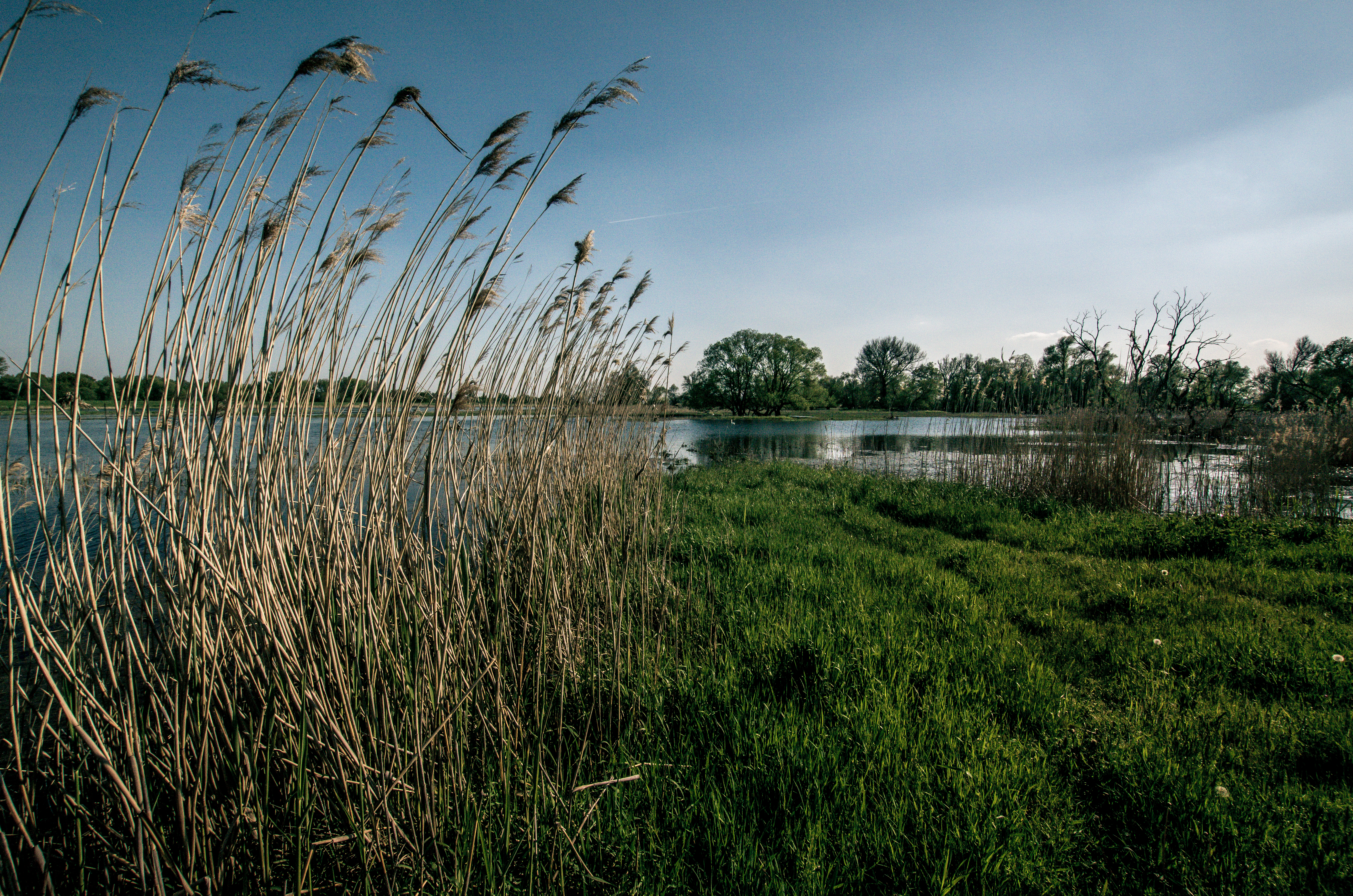 Oder und Oderwiesen bei Lebus Busch